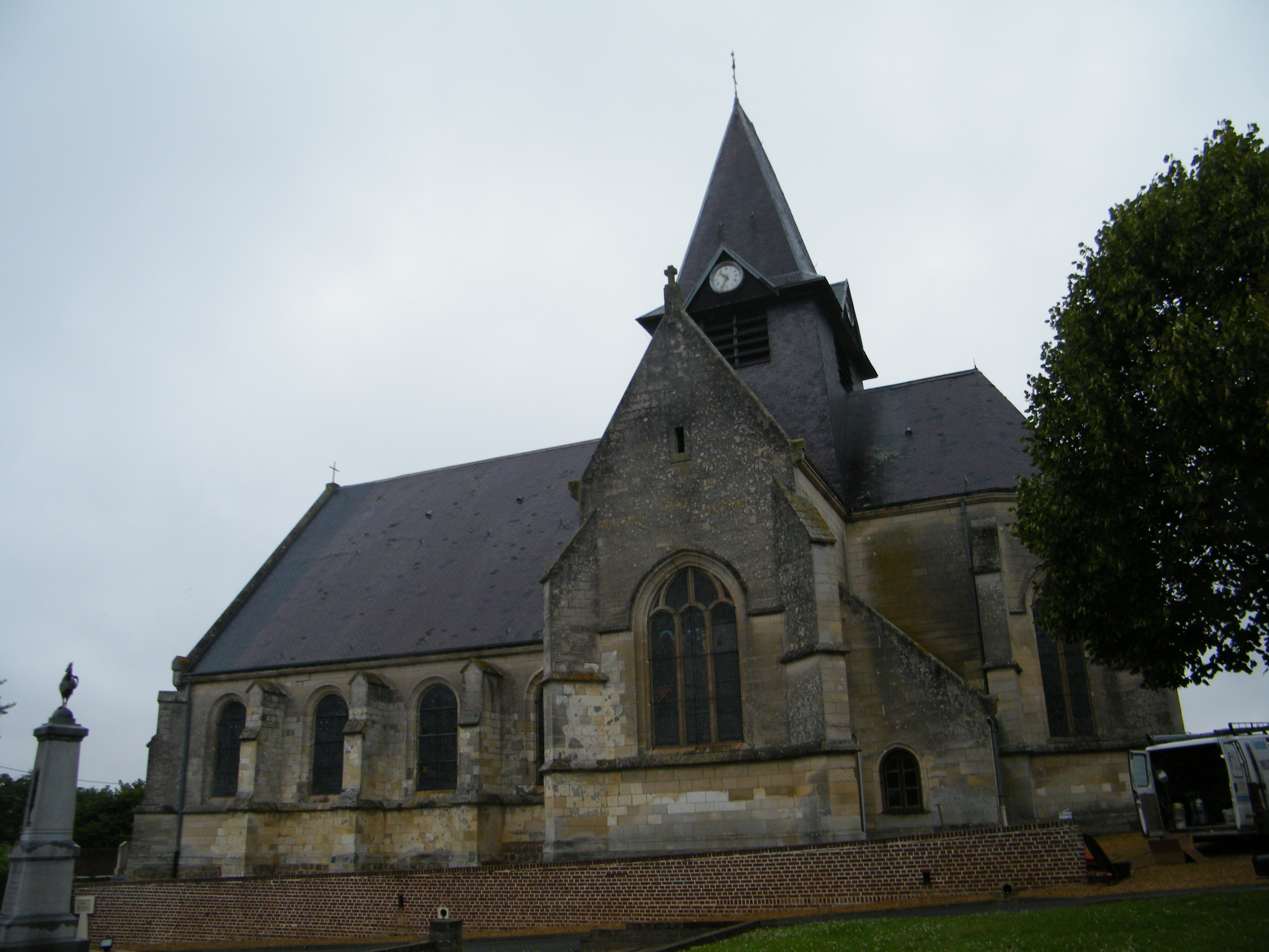 Herleville, Somme, France, église Saint-Aubin.